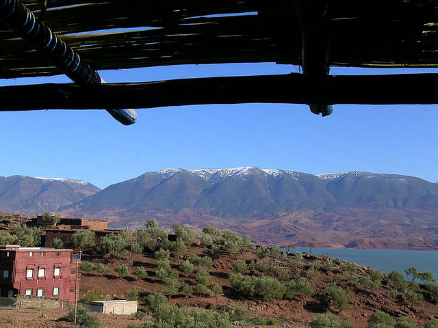 Morocco38